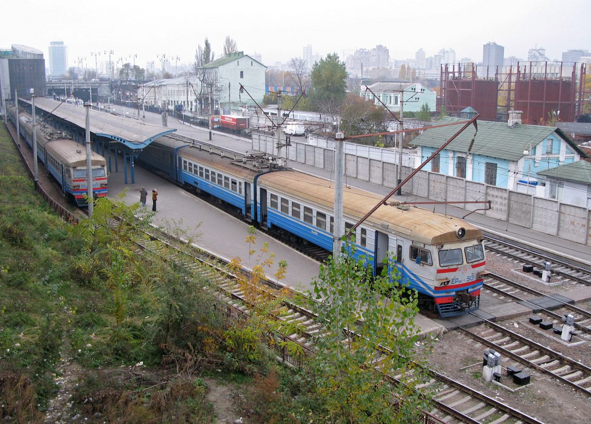 з. п. Північна, ст. Київ-Товарний